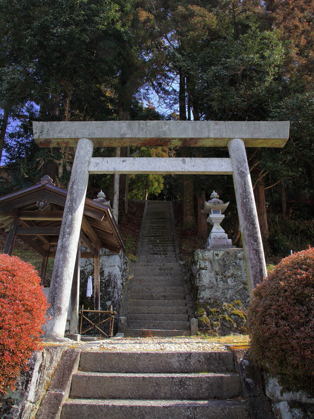 神明神社（豊田市小渡町、2012年）